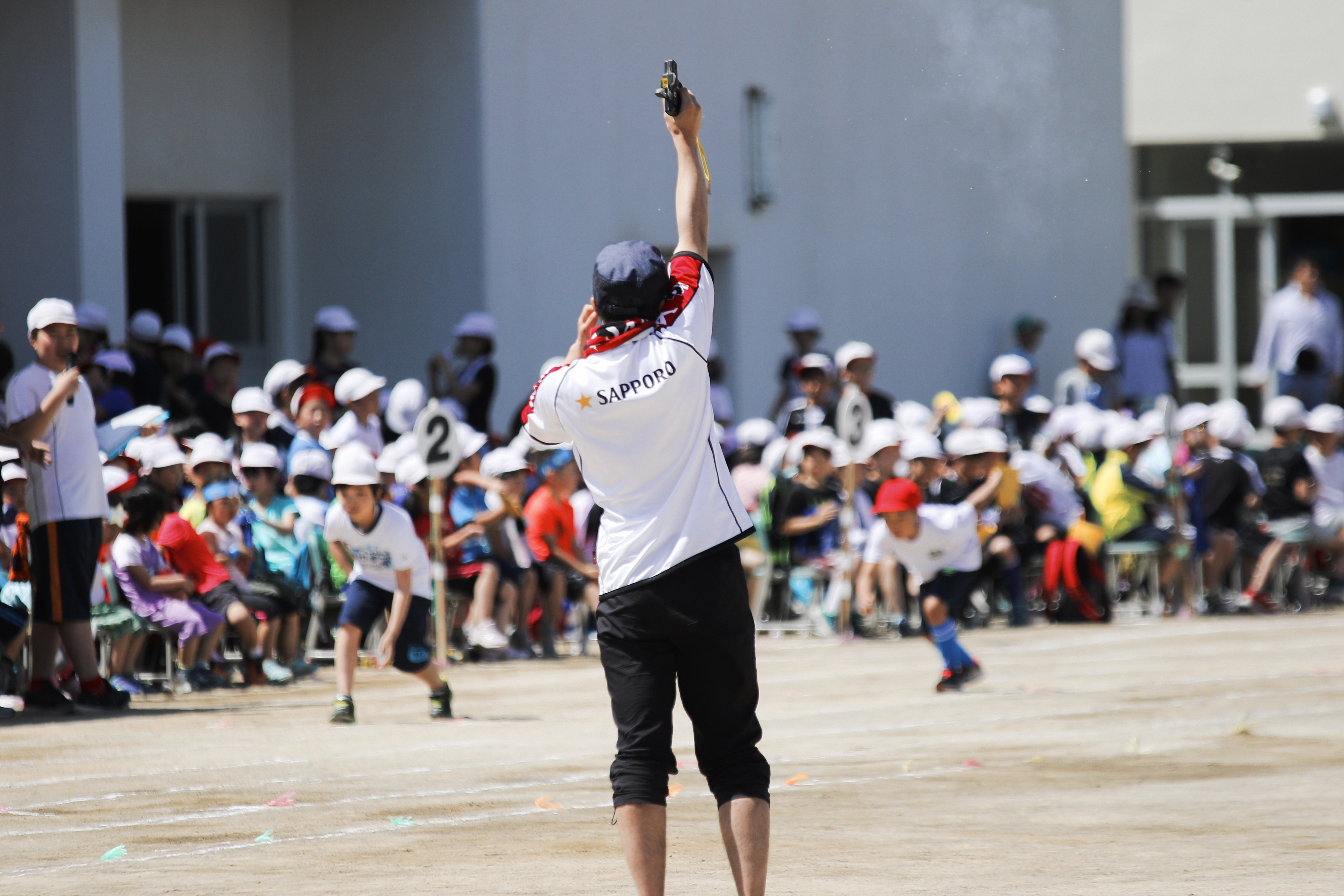 運動会2019.